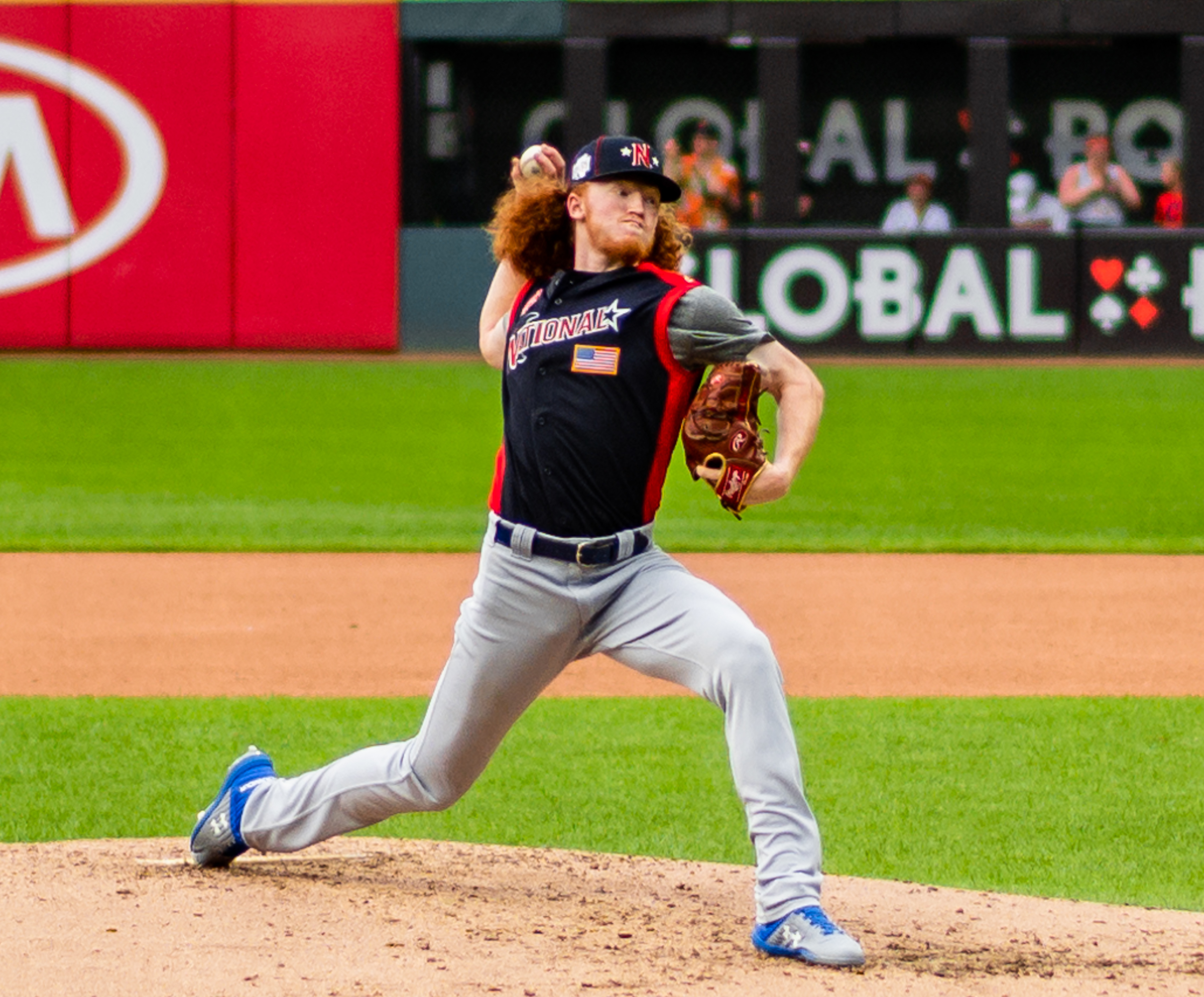 MLB All-Star Futures Game